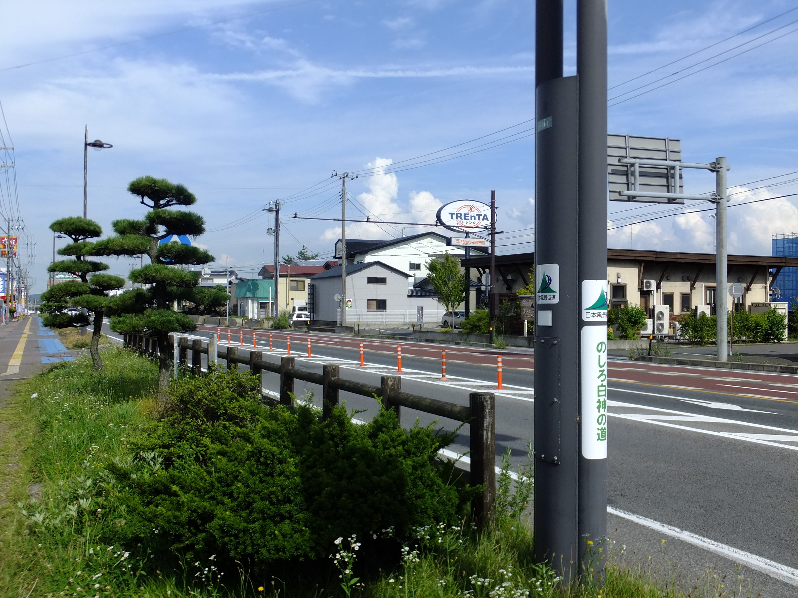 「のしろ白神の道」を示すステッカー。秋田県能代市、芝童森（しどうもり）交差点にて